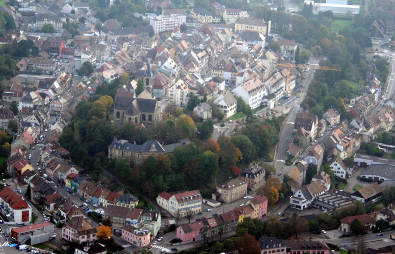 Altkirch